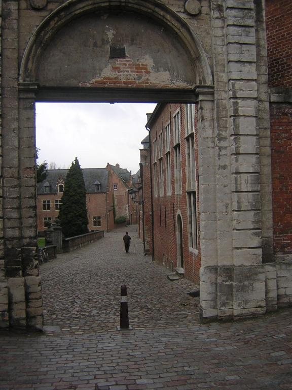 Toegangspoort tot het Groot Begijnhof van Leuven.